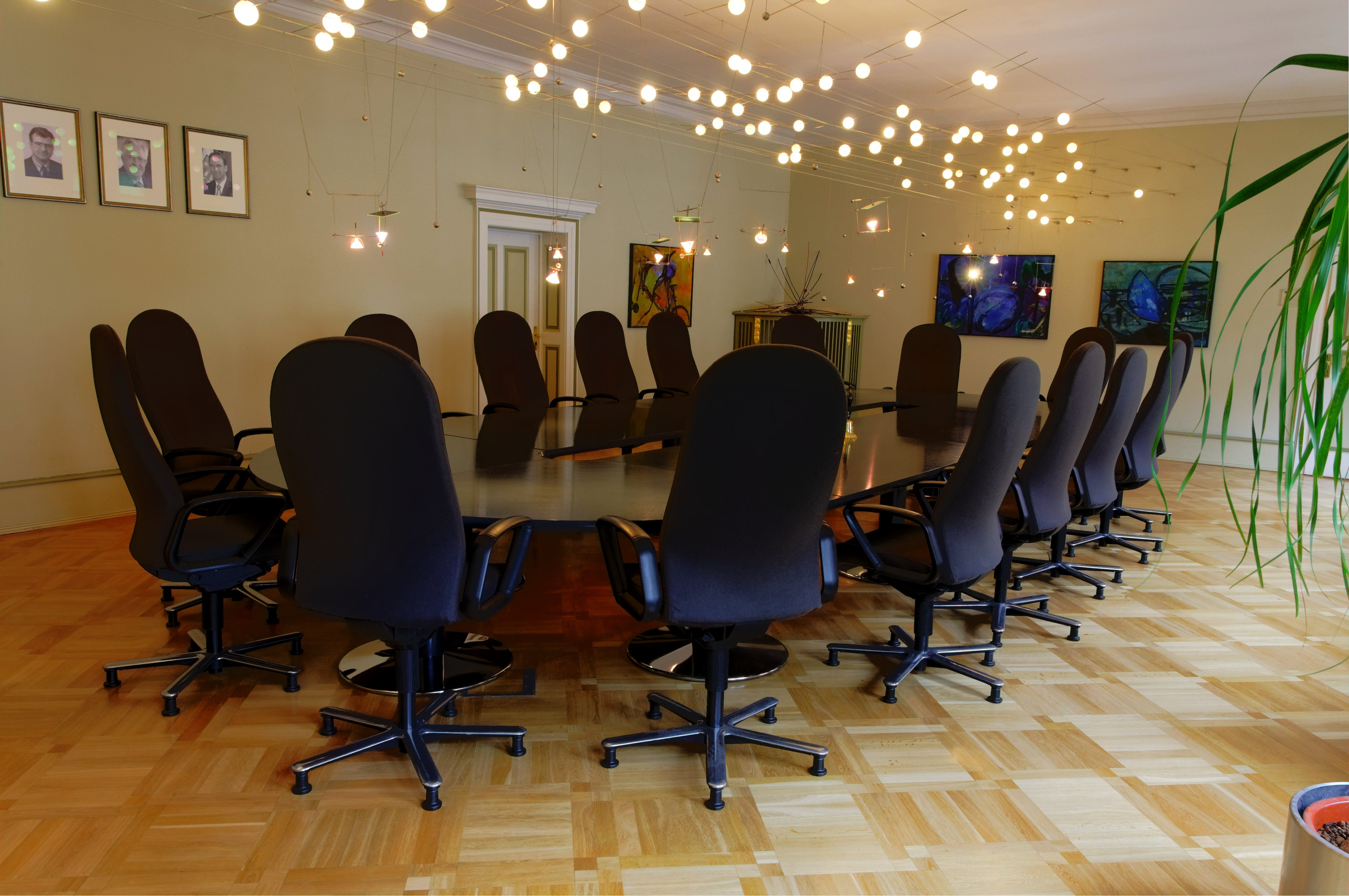 Thüringer Staatskanzlei - Innen